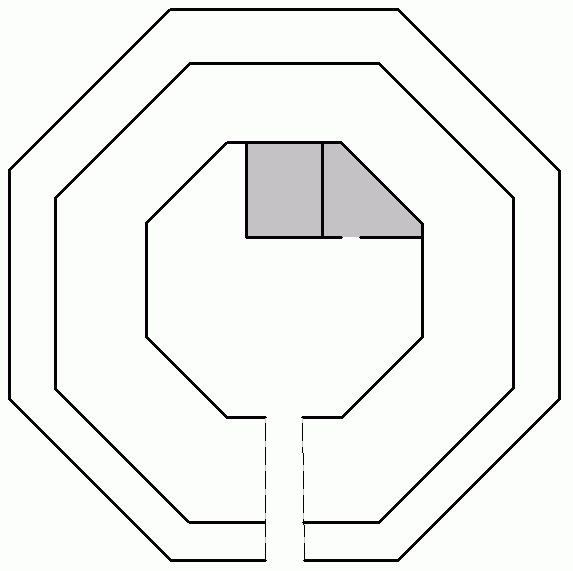 Schloss Kilchberg, nachgezeichnet siehe Vorlage